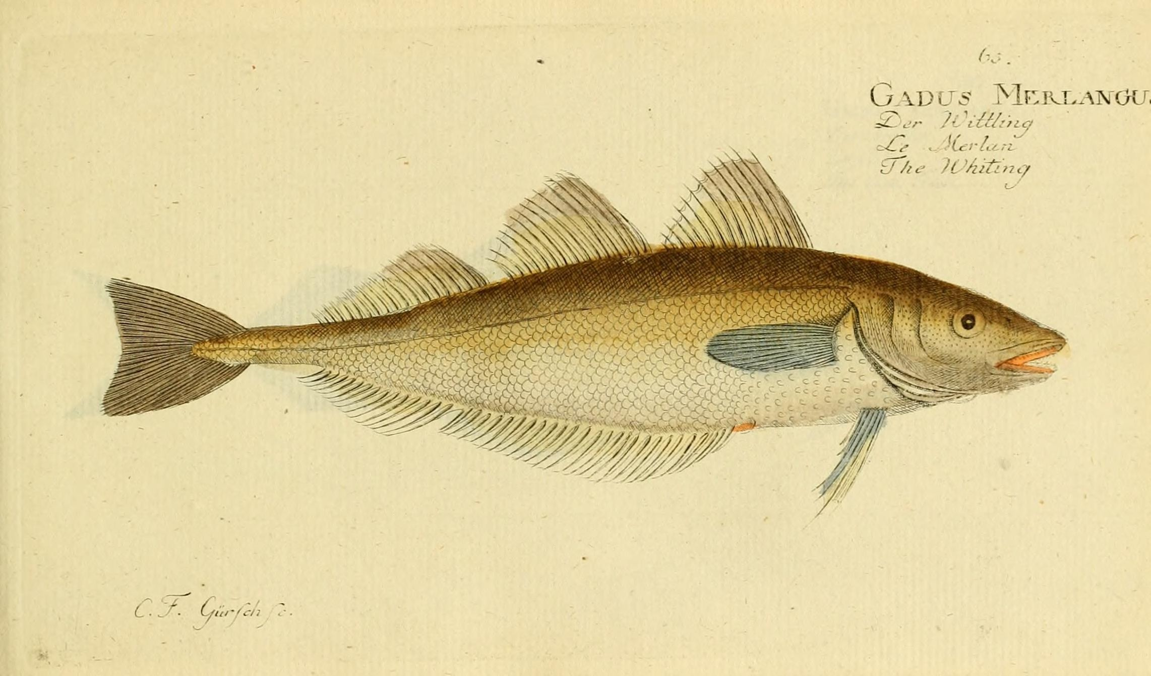 6j G \dus Melrjiantkj. ^■^v- . /ter la n ( -. ÇûrfJi